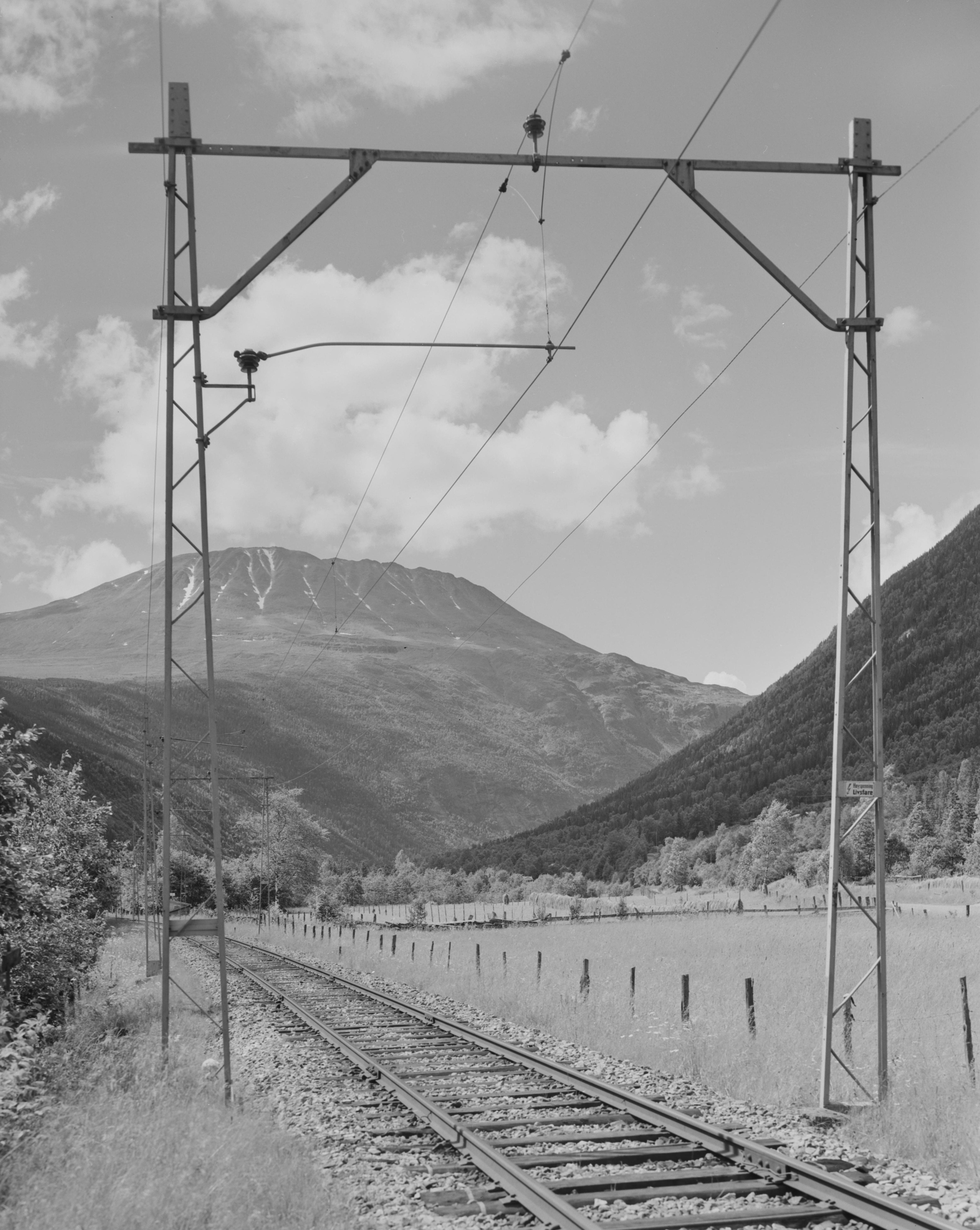 Bildet er hentet fra Nasjonalbibliotekets bildesamling Gaustatoppen,Vestfjorddalen, Tinn, Telemark